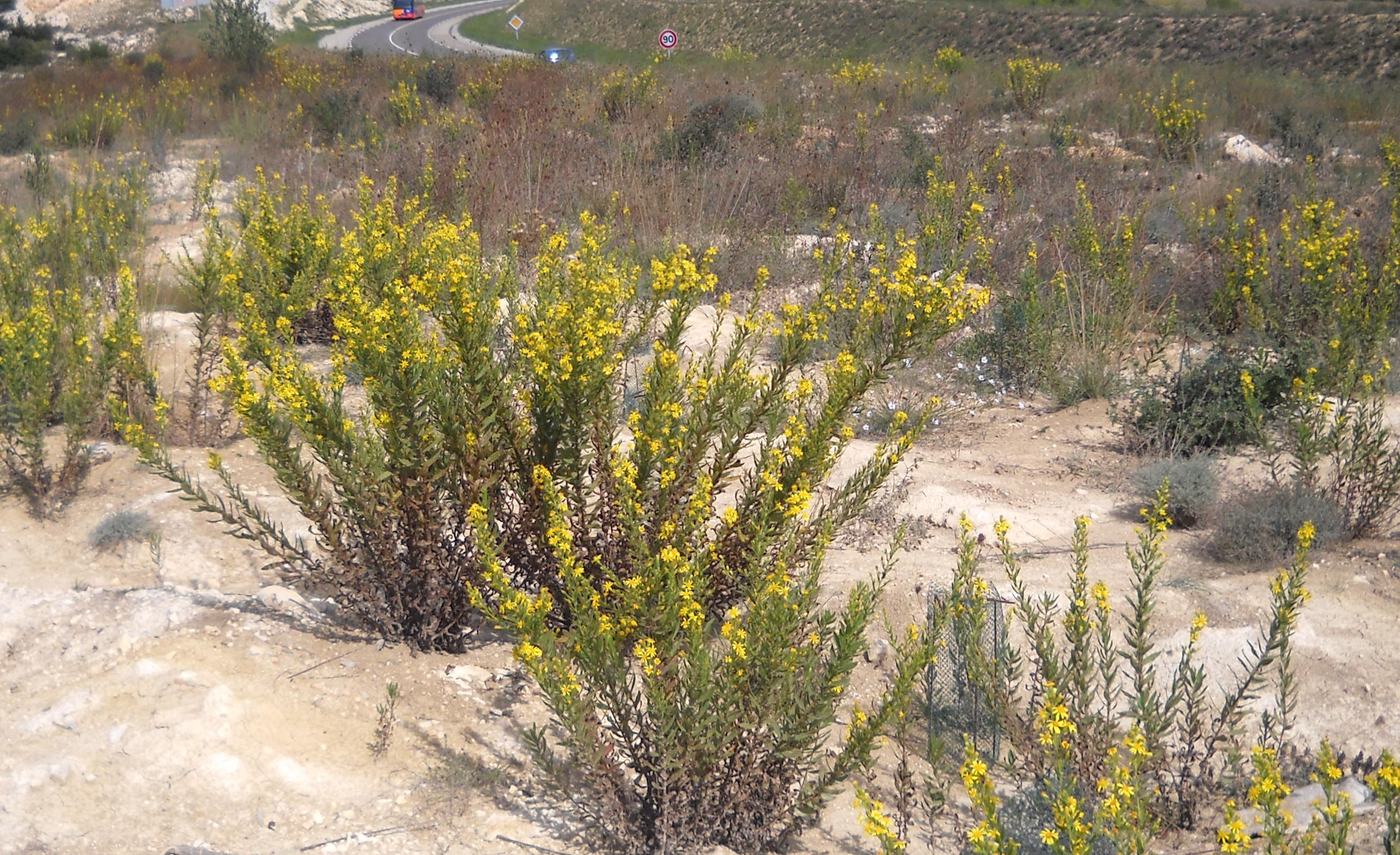 Ditrichia viscosa en milieu ouvert : appareil végétatif